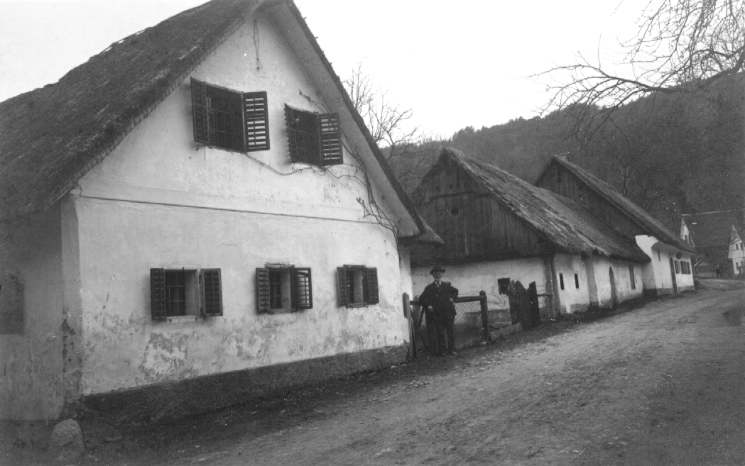 Naselje Gunclje